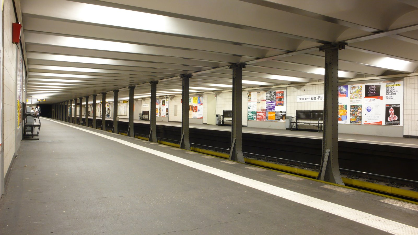 Ubahnh Th.Heuss Platz